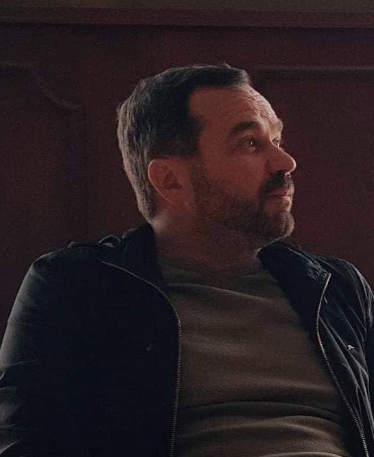 В.Э. Ширяев на подготовках к съемках фильма "Тайна Таис".